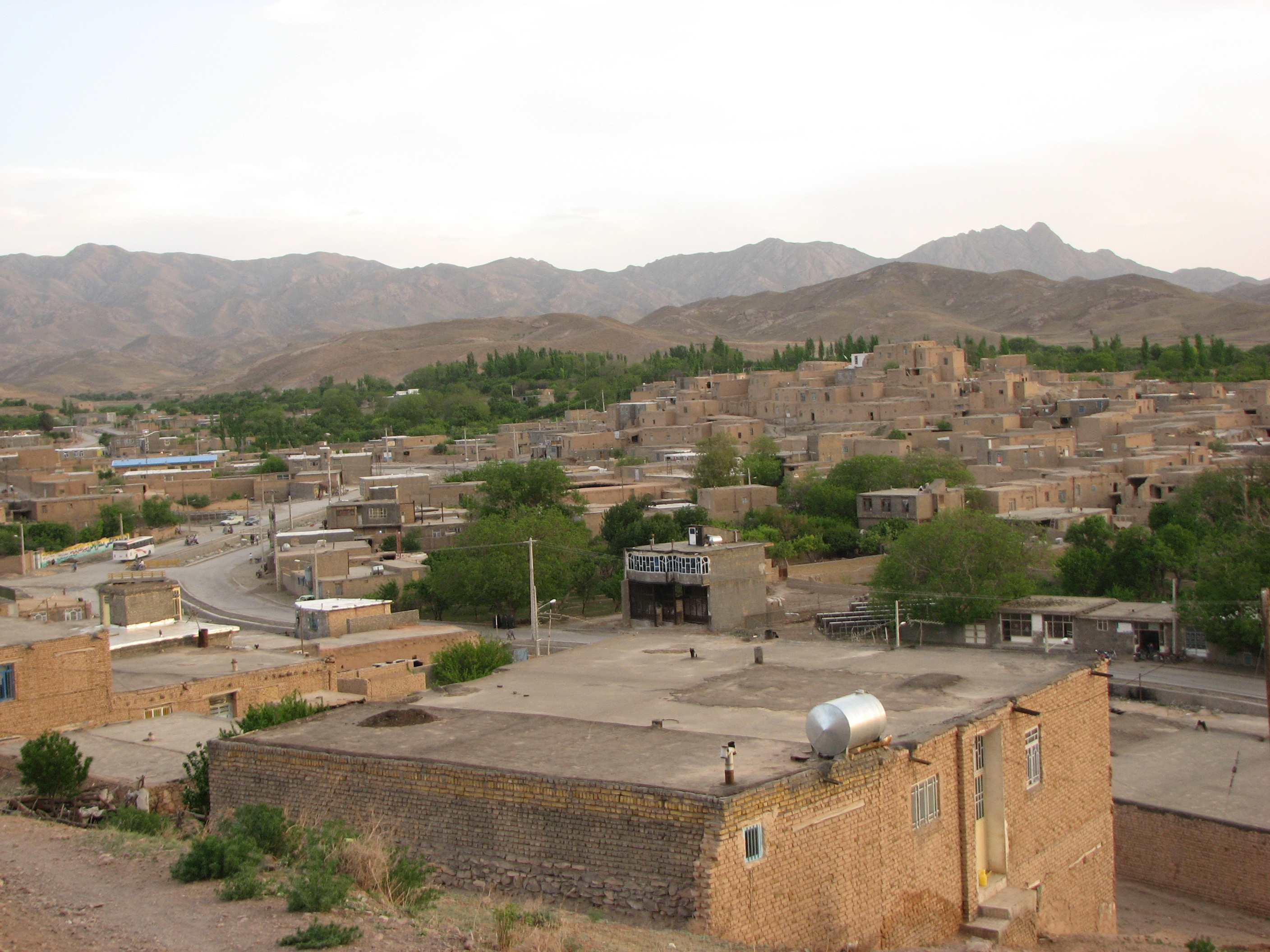 بافت قدیمی و پلکانی مرکز روستای ساق از مصالح :کاه گل وخشت خام